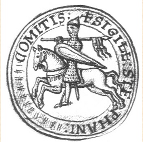 Sceau du comte Etienne-Henri (1089)